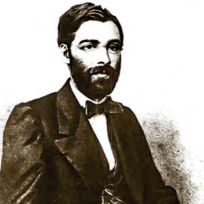 José Martiniano de Alencar (Messejana, 1 de maio de 1829 — Rio de Janeiro, 12 de dezembro de 1877)